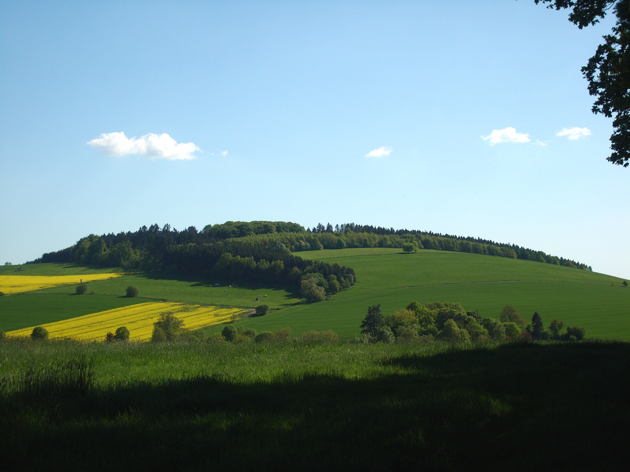 Der Allenberg zwischen Schoningen und Uslar. POV: Allershäuser Sportplatz.